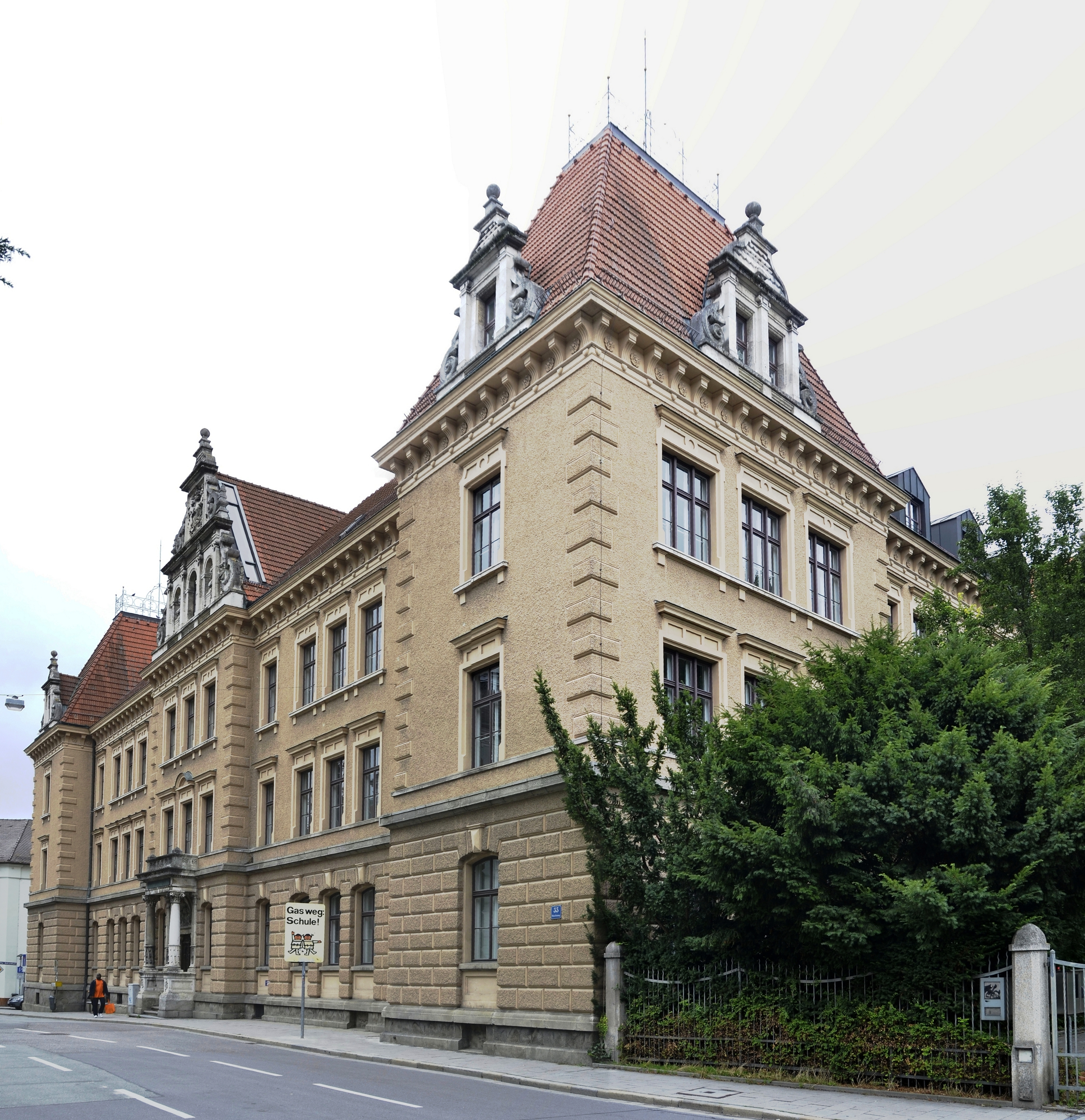 Das Albrecht-Altdorfer-Gymnasium (Minoritenweg 33/Ostnerwacht) in Regensburg, Bayern.